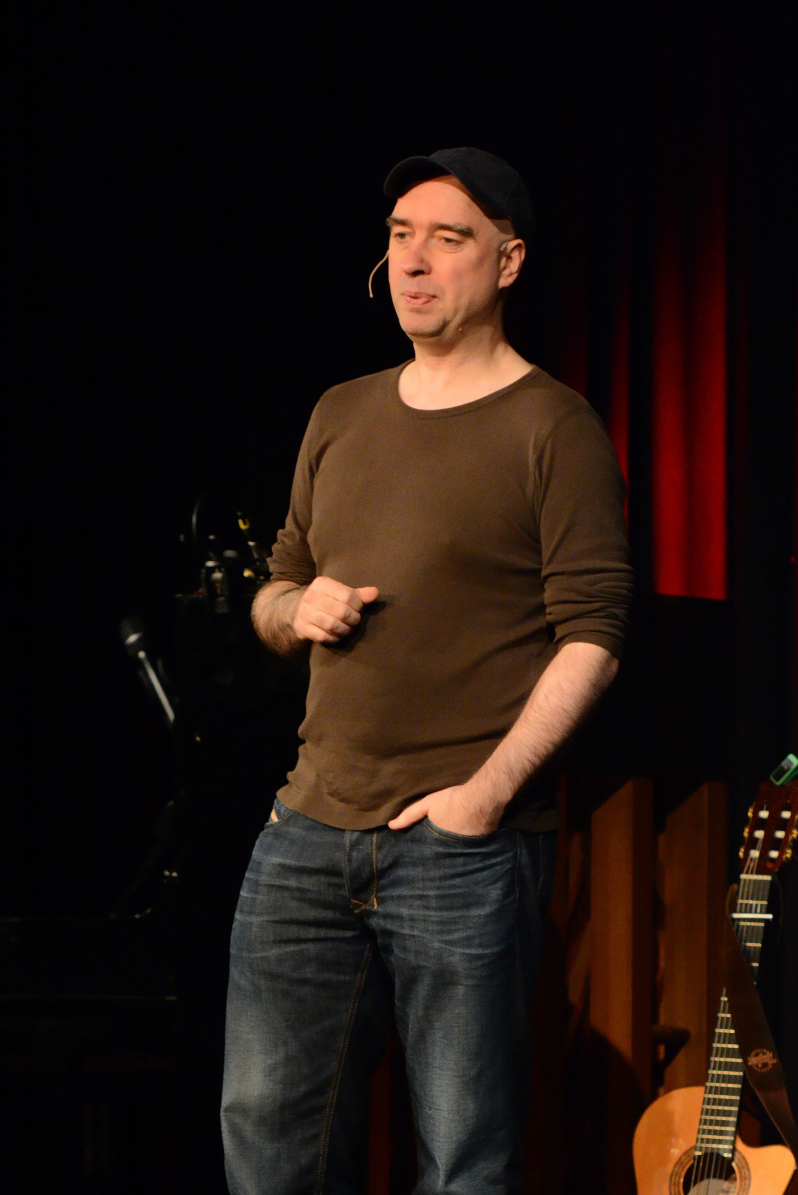 HG. Butzko bei einer Tourneevorstellung von Tegtmeiers Erben 2013 in der Stadthalle Mülheim.